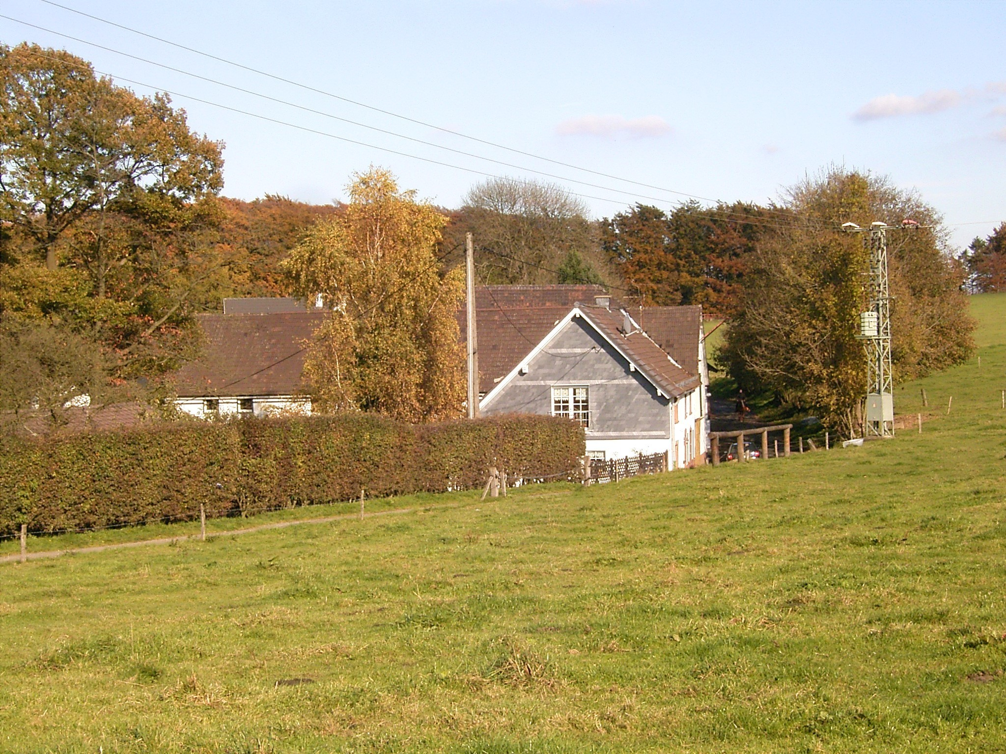 Radevormwald